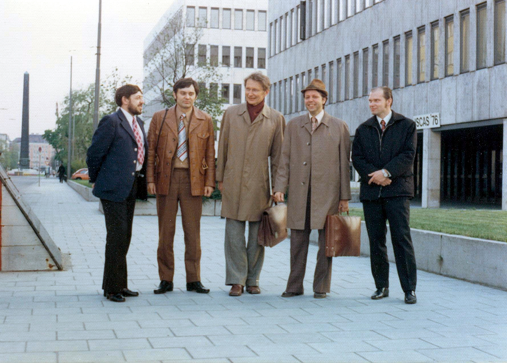 Manfred Börner (Mitte) 1976 mit Kollegen und Mitarbeitern auf der Filtertagung in München; Links Herr Tunka aus Prag